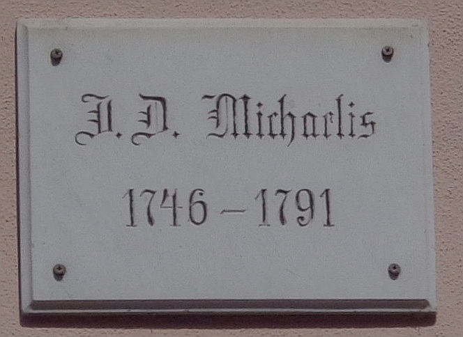 Göttinger Gedenktafel für Johann David Michaelis, Orientalist und Theologe, am "Michaelishaus" in der Prinzenstraße 21.